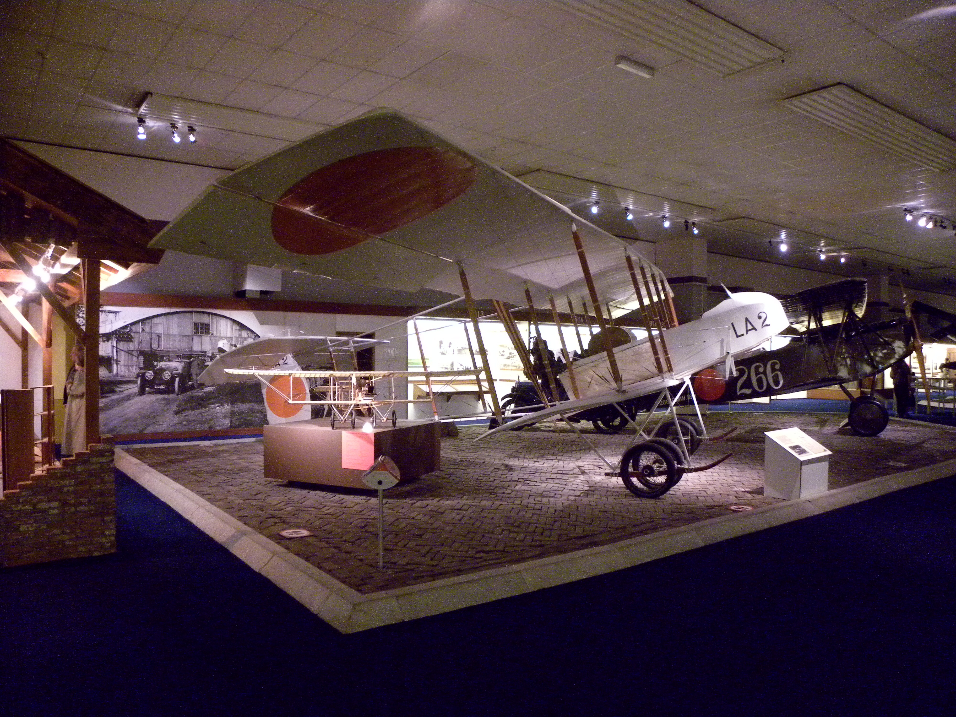 seen at militare luchtvaart museum Soesterberg